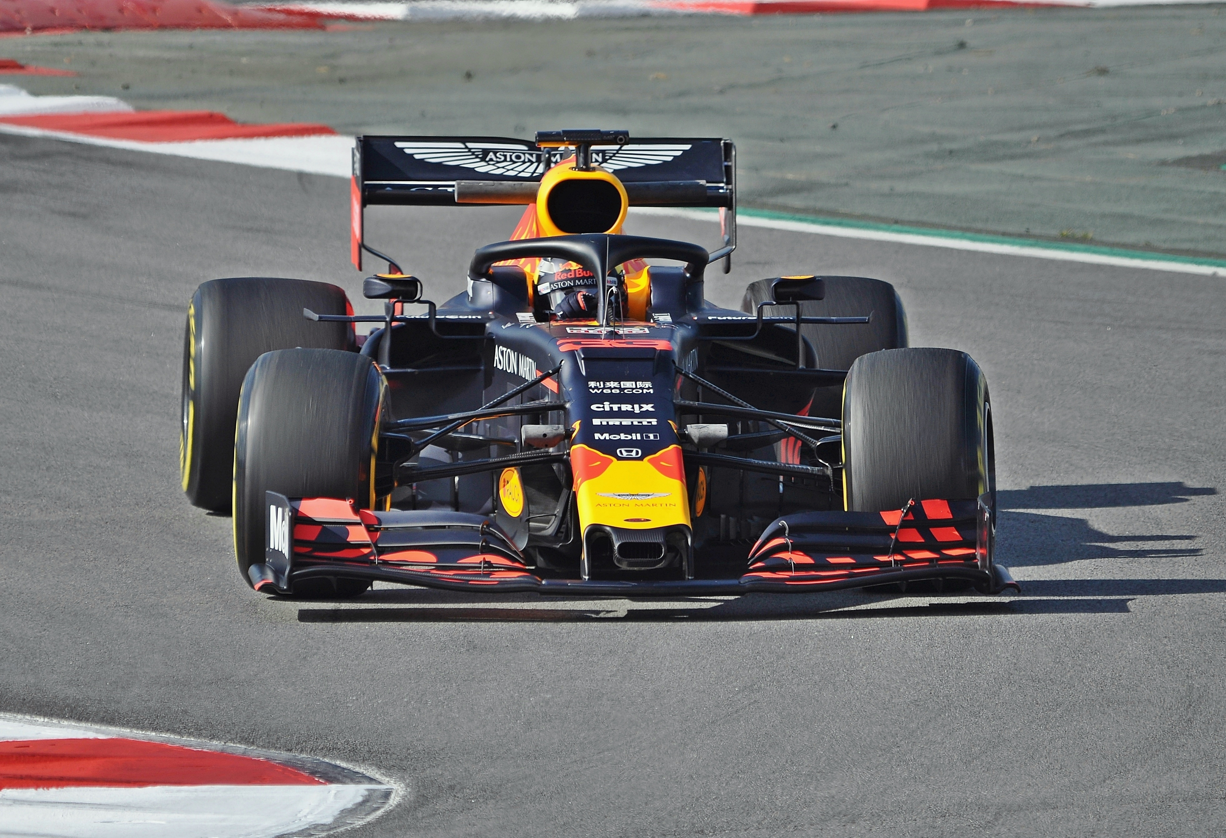 Test Days-Circuito de Catalunya